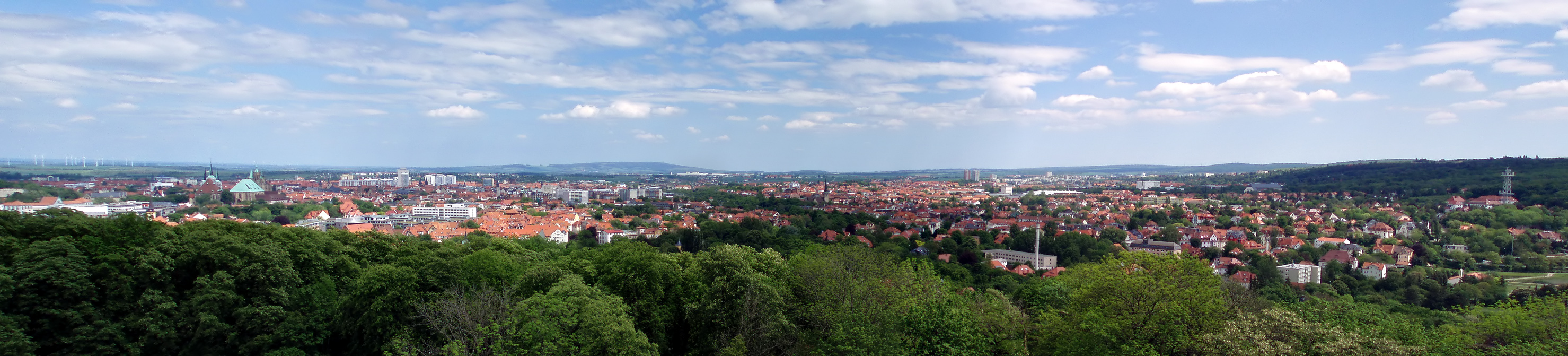 Erfurt Panorama über die Stadt vom Ega-Turm aus